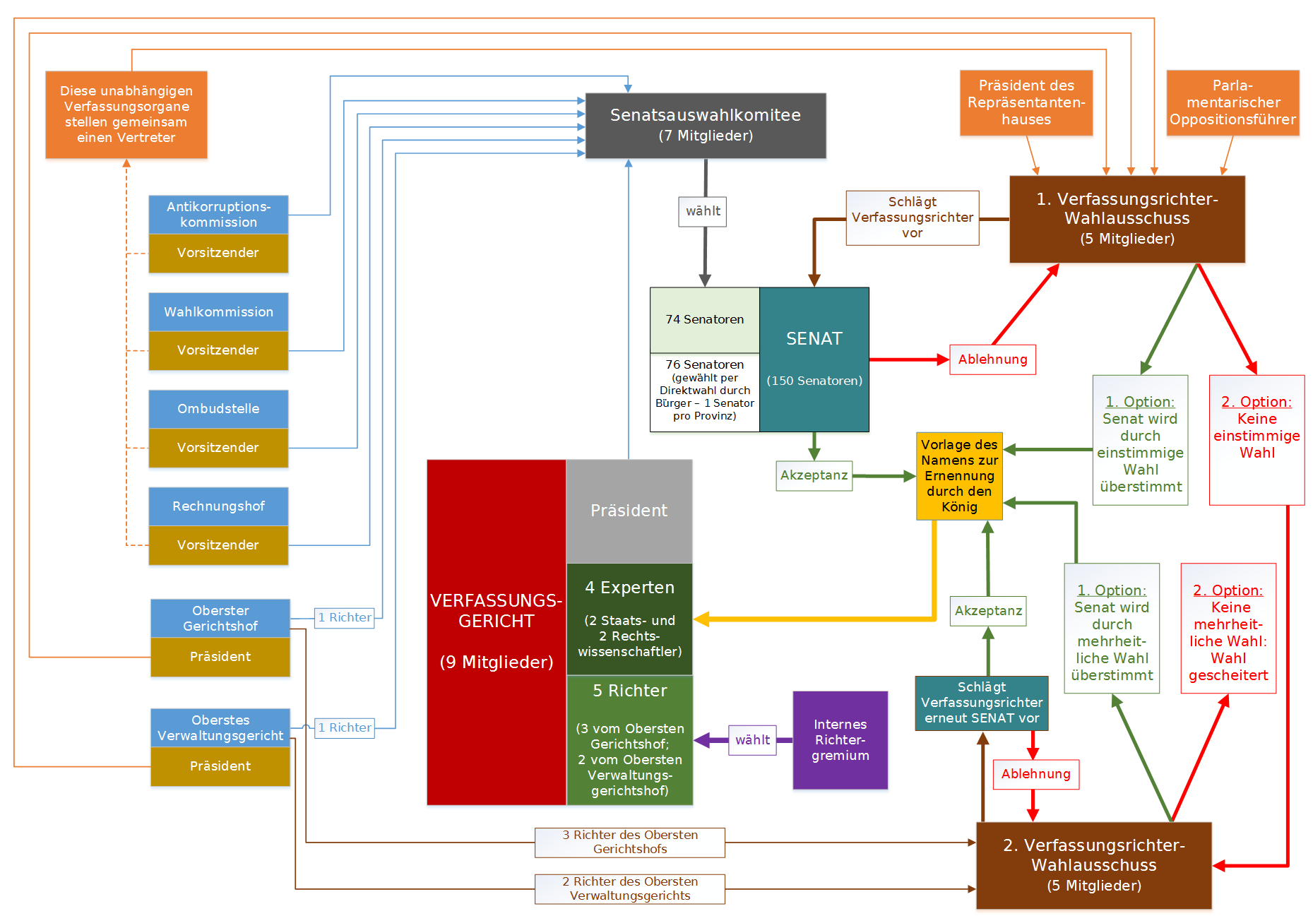 Entstehung und Zusammensetzung des Thailändischen Verfassungsgerichts nach der Thailändischen Verfassungs von 2007.